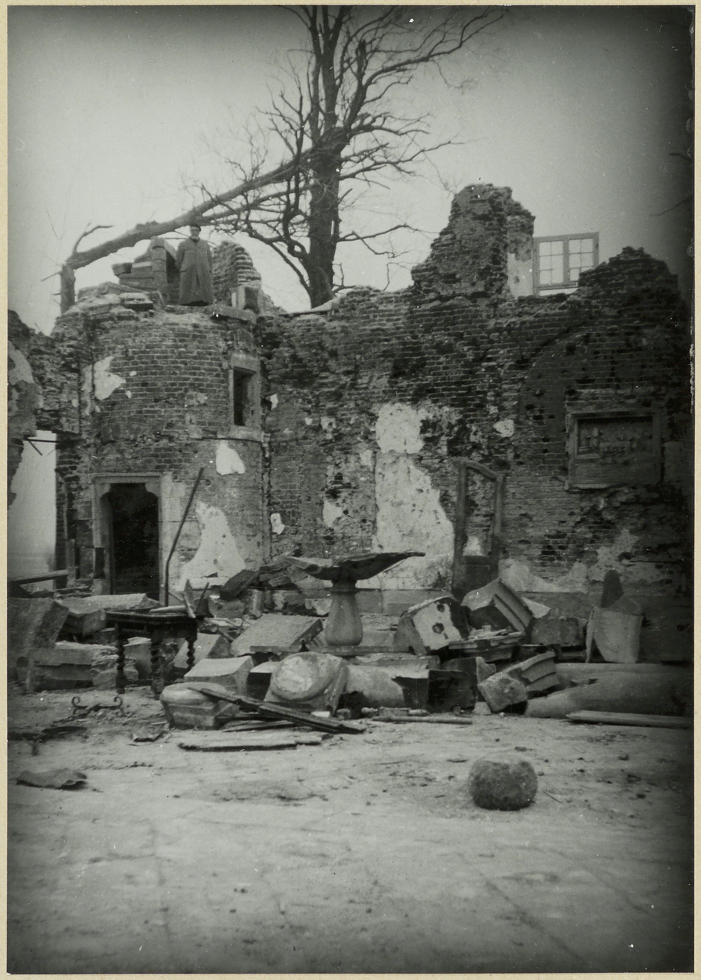 Kasteel: Ruïne na oorlogshandelingen (opmerking: Zie ook neg 260.982 repro 1995)